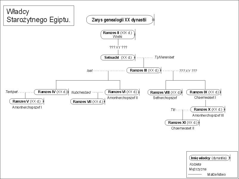 Zarys genealogii XX dynastii Kategoria:Drzewa genealogiczne